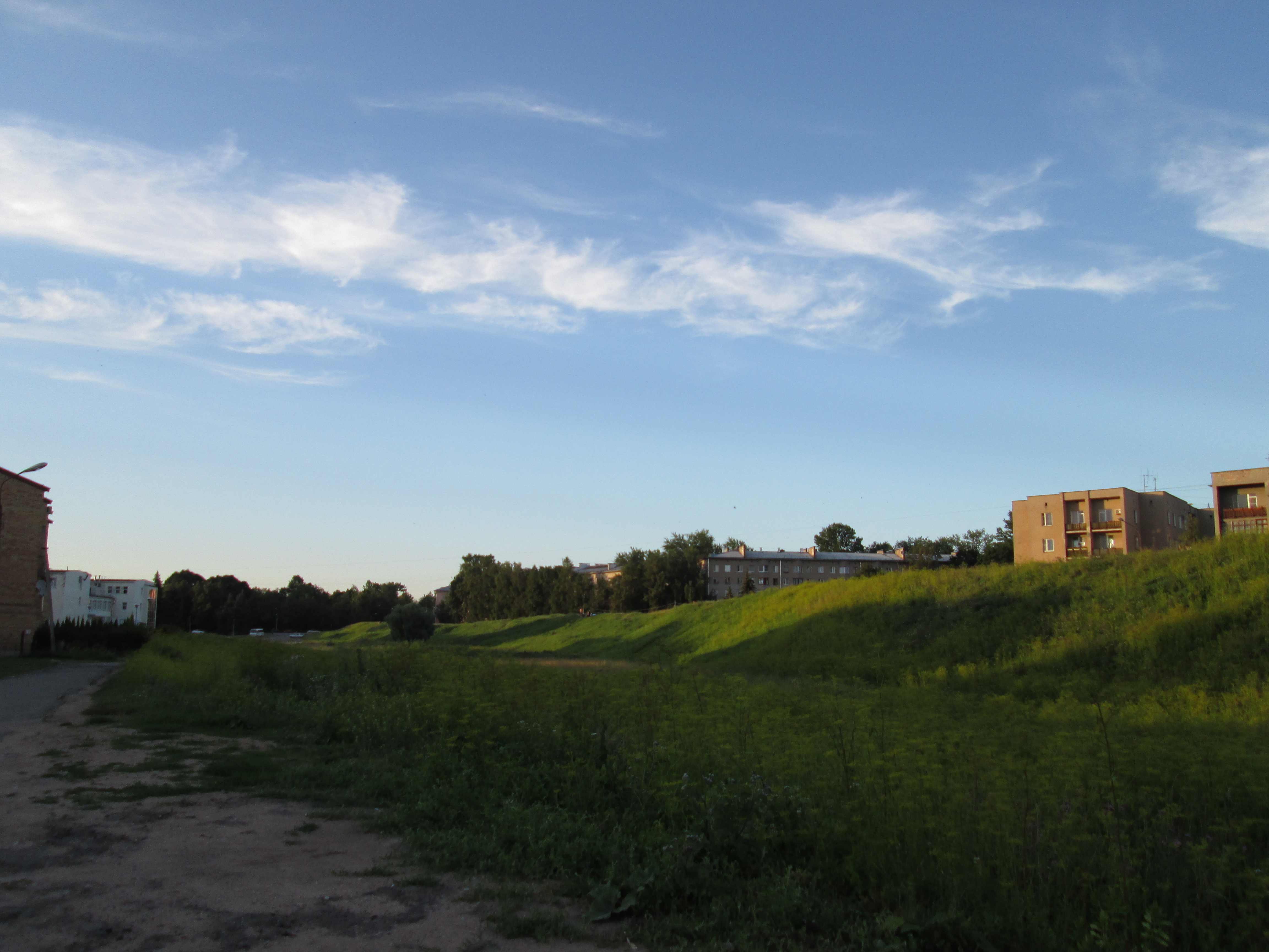 Земляной вал Окольного города Великого Новогорода